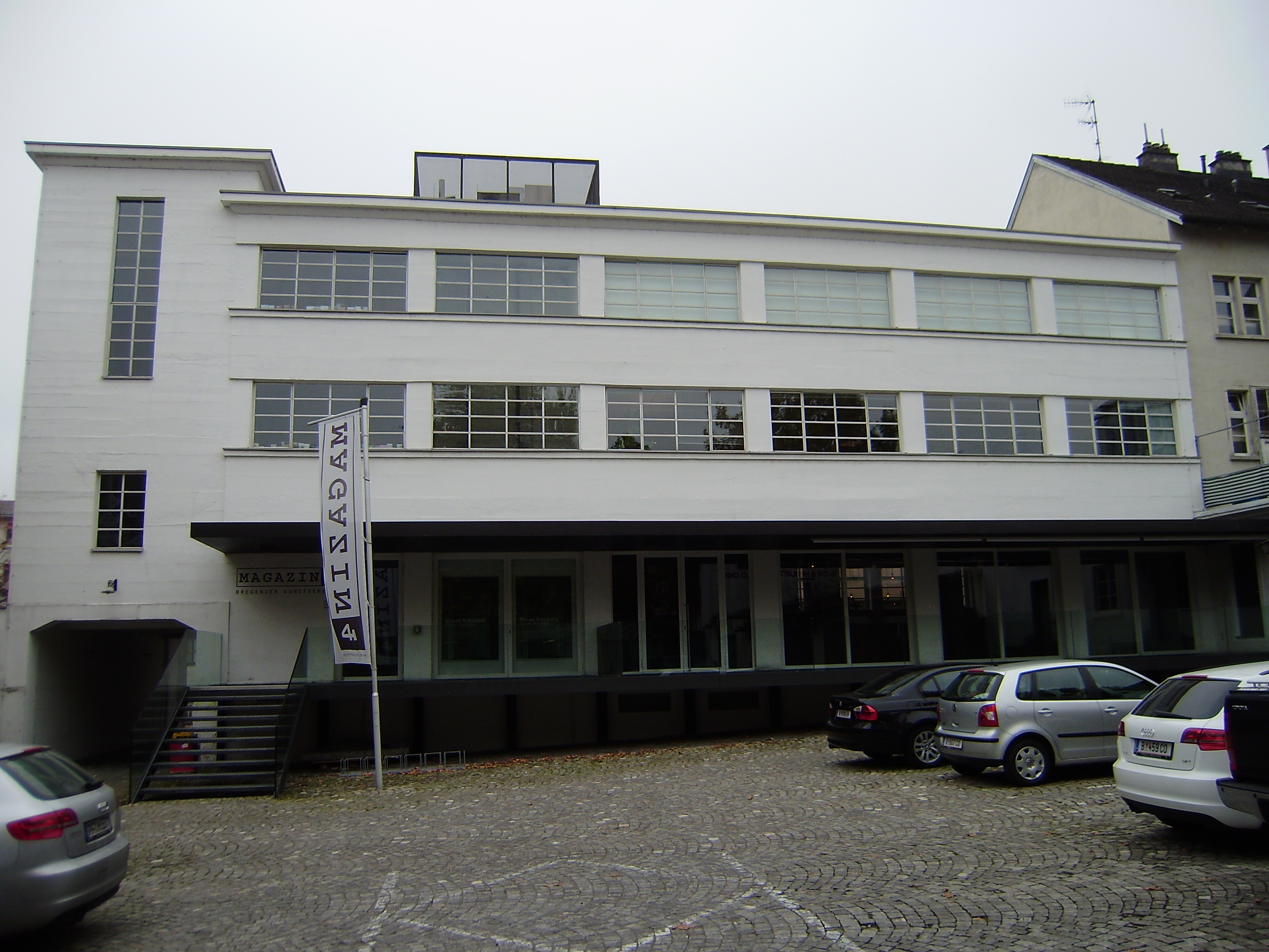 Ehem Lagerhaus Pircher in Bregenz Vorarlberg, heute Kulturzentrum Magazin 4, Hofseite